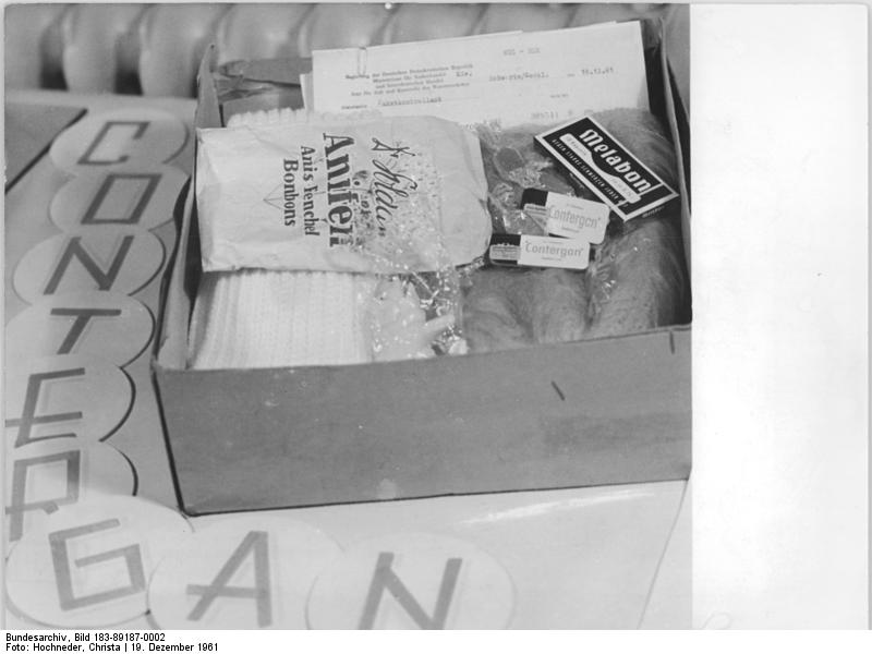 Zentralbild Hochneder 21.12.1961 Medikamentenschmuggel in Weihnachtssendungen Eine Dokumentation der Unmenschlichkeit und des Verbrechens stellt eine Ausstellung des Amtes für Zoll und Kontrolle des Warenverkehrs dar, die am 19.12.61 vor Pressevertretern im Ministerium für Gesundheitswesen in Berlin eröffnet wurde. Vom Abtreibungsmittel in der Zigarettenpackung bis zum Contergan im Bonbonpapier, vom gefährlichen Antibiotikum in der aufgeschnittenen Marzipanfigur bis zum srtark arsenhaldigen Präperat in der Schachtel einer Mattcreme sind heir Beweise angehäuft, die das Ausmaß der Gefahr kennzeichnen, die die Bevölkerung der DDR durch den Medikamentenschmuggel aus Westberlin ausgesetzt wird. UBz: In einer "Geschenksendung" befand sich neben anderen Medikamenten das gefährliche Contergan.